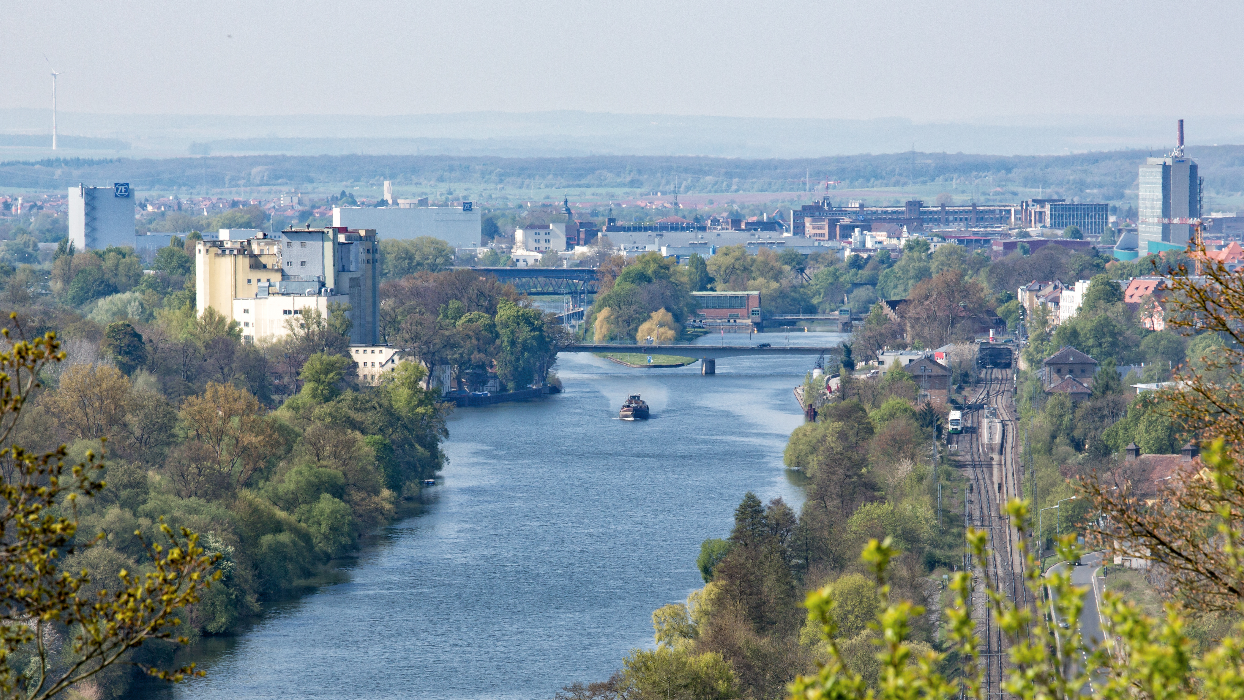 Blick von der Peterstirn auf die Stadteinfahrt via Main aus dem Westen